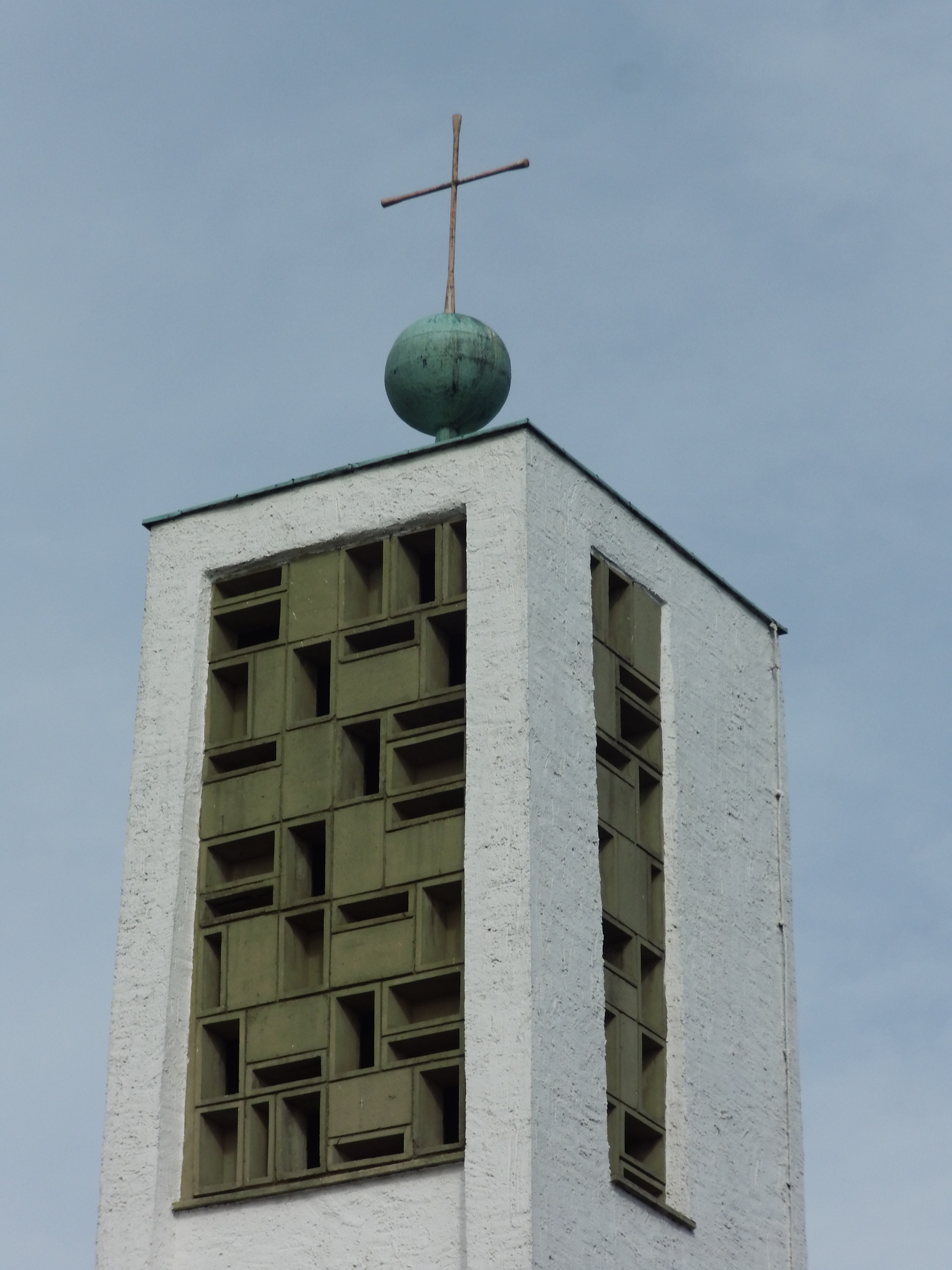 Kirchturmspitze mit Kreuz